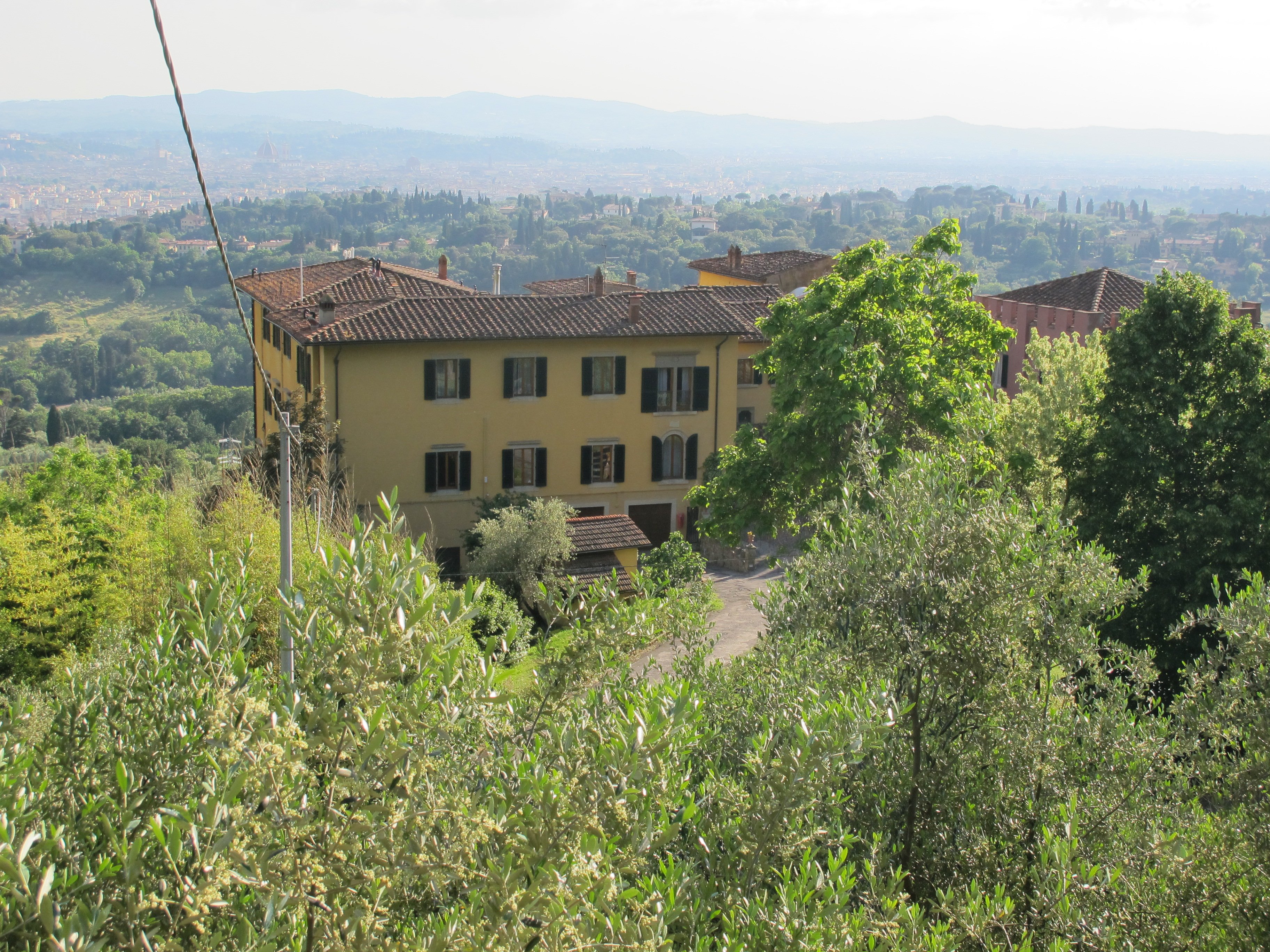 Villa bencistà